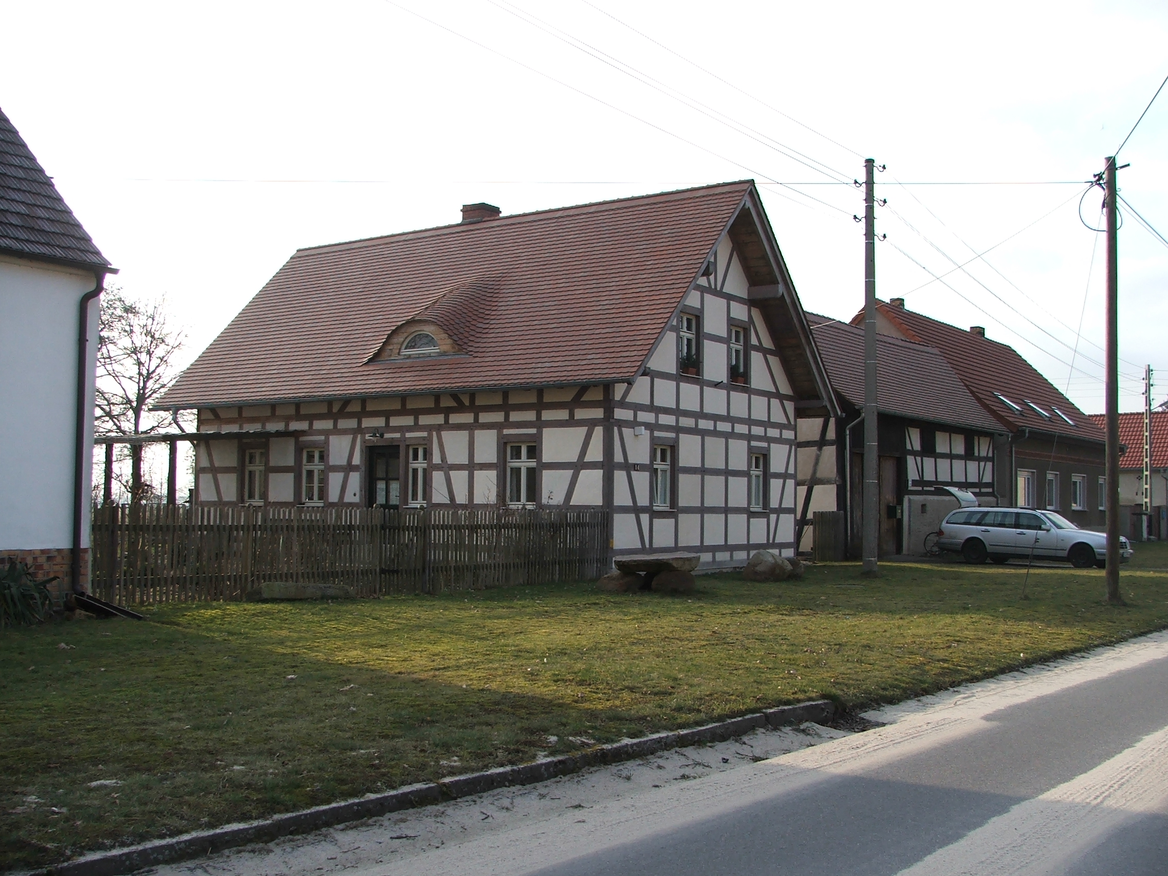 alter Bauernhof in Drasdo